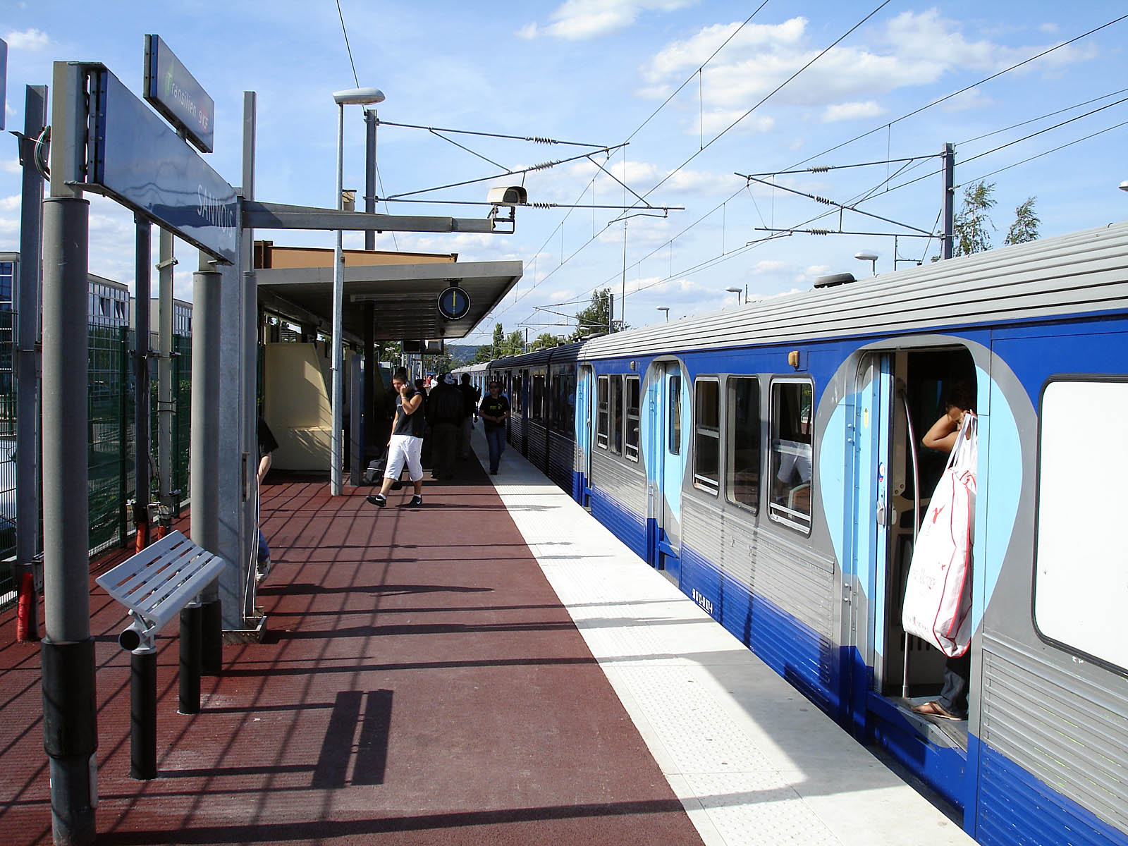 La gare de Sannois, Val-d'Oise, France.